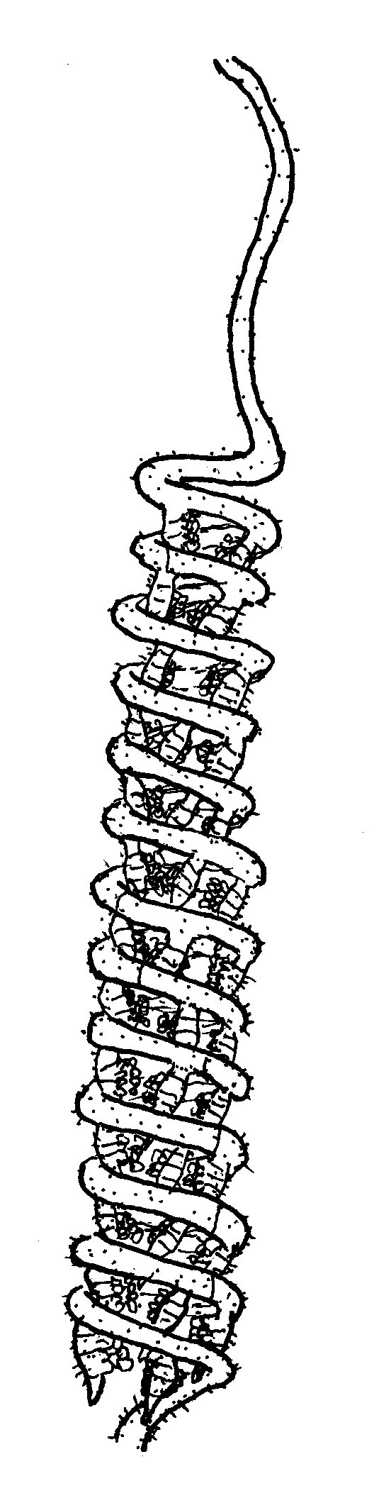 R. K. Benjamin (1959)より模写